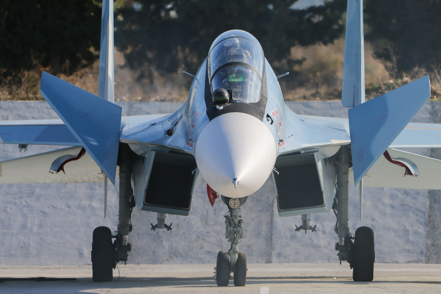 Будни авиагруппы ВКС РФ на аэродроме Хмеймим в Сирии